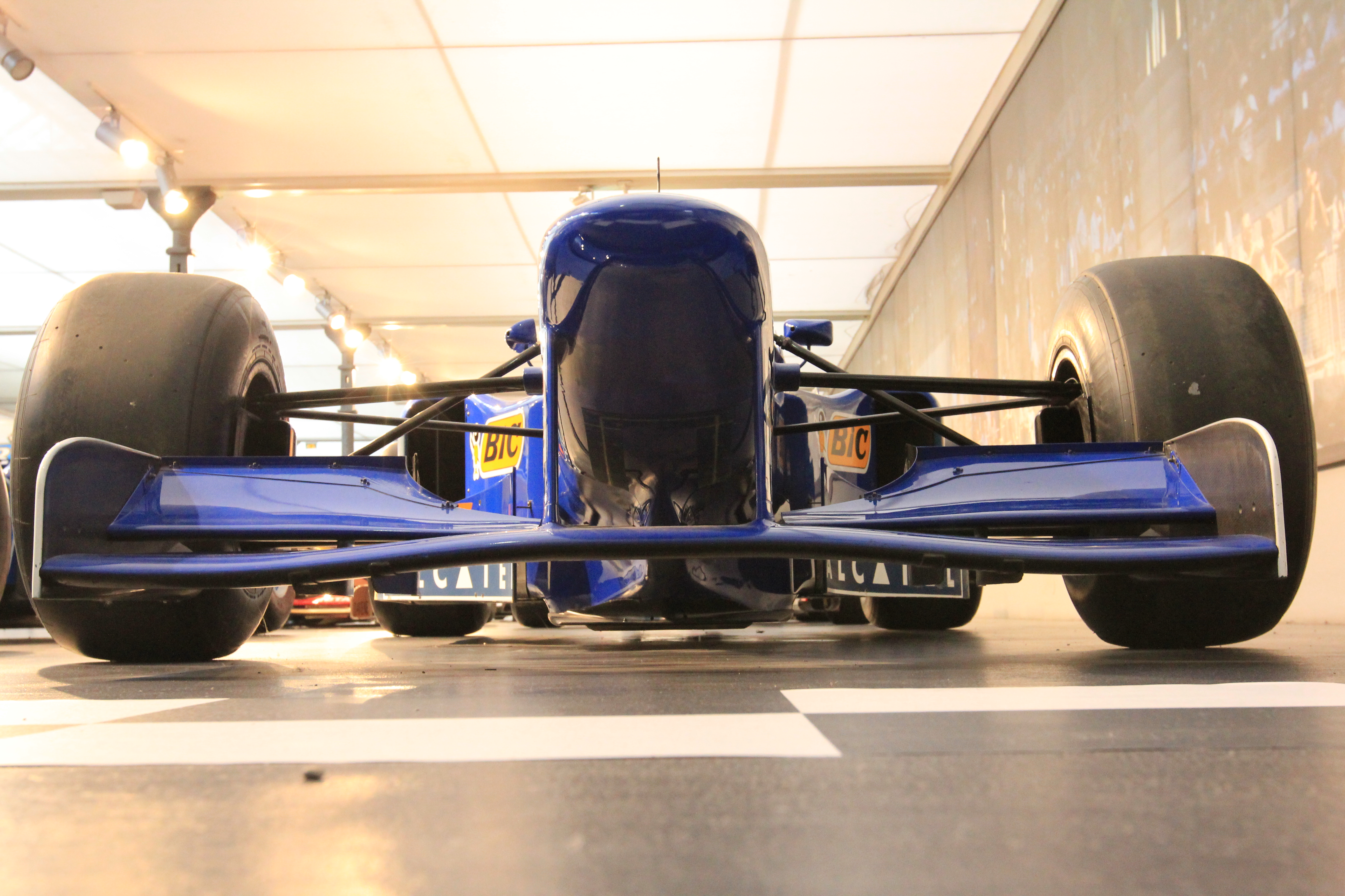 Musée de l'automobile - Mulhouse - Prost Grand Prix - IMG_2532